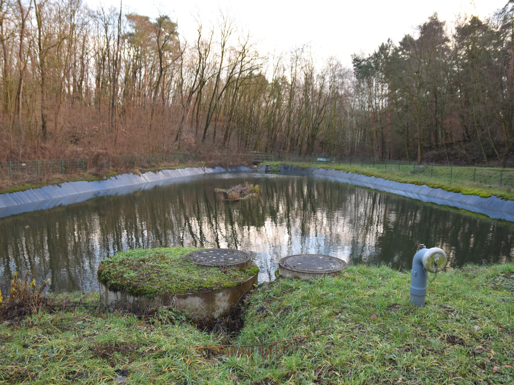 Löschteich Klinikum Frankfurt (Oder)-Markendorf